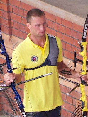 Viktor Ruban